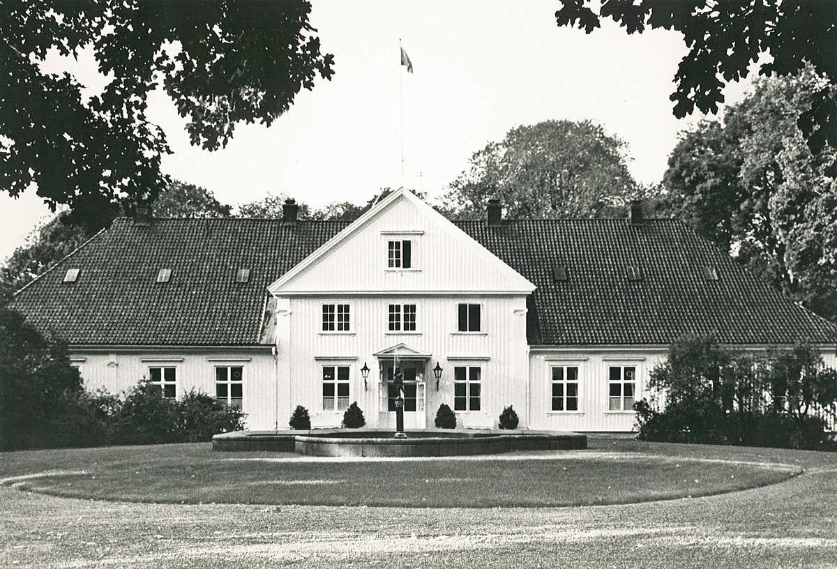 Bygdøy kongsgård, kongebanner, hage, basseng.